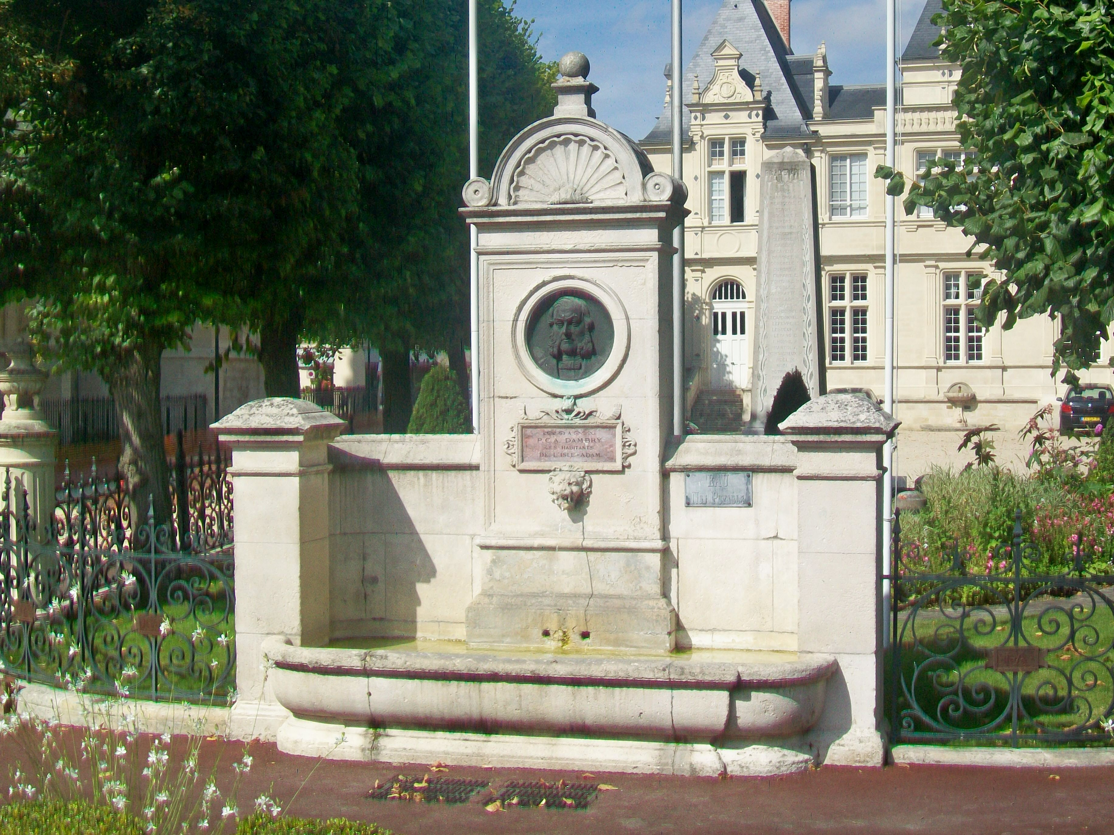 Fontaine en l'honneur de Charles Dambry, au nord de la mairie.